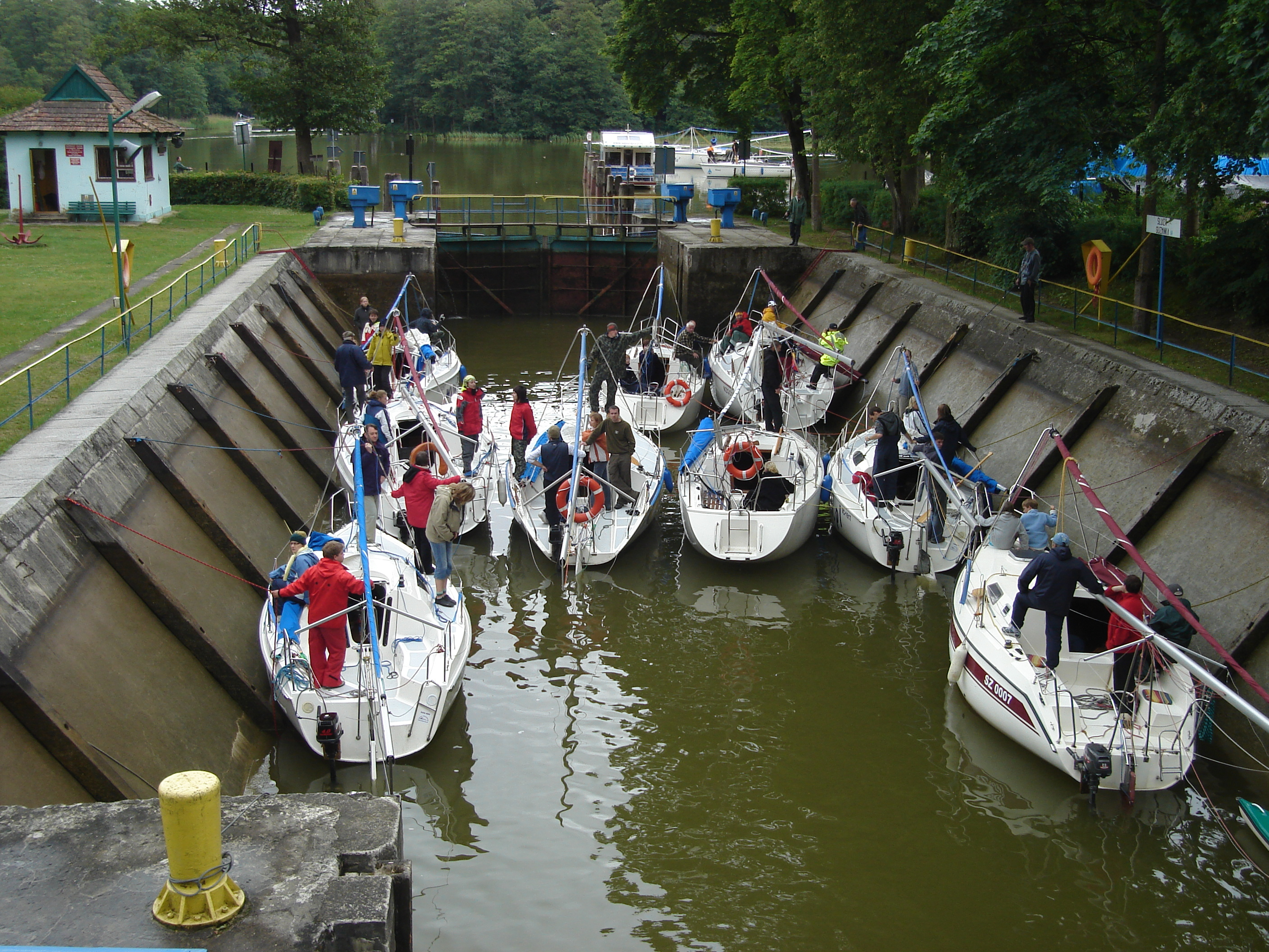 Śluza Guzianka. Przygotowanie do wypełnienia śluzy